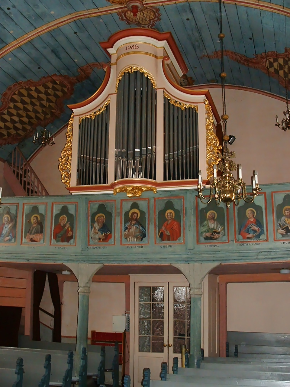 Evangelische Kirche Stipshausen, Stumm-Orgel